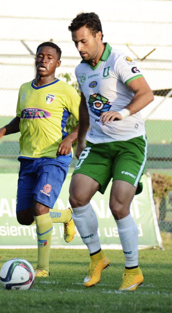 Javier Guarino jugando en Liga de Portoviejo de Ecuador en 2015